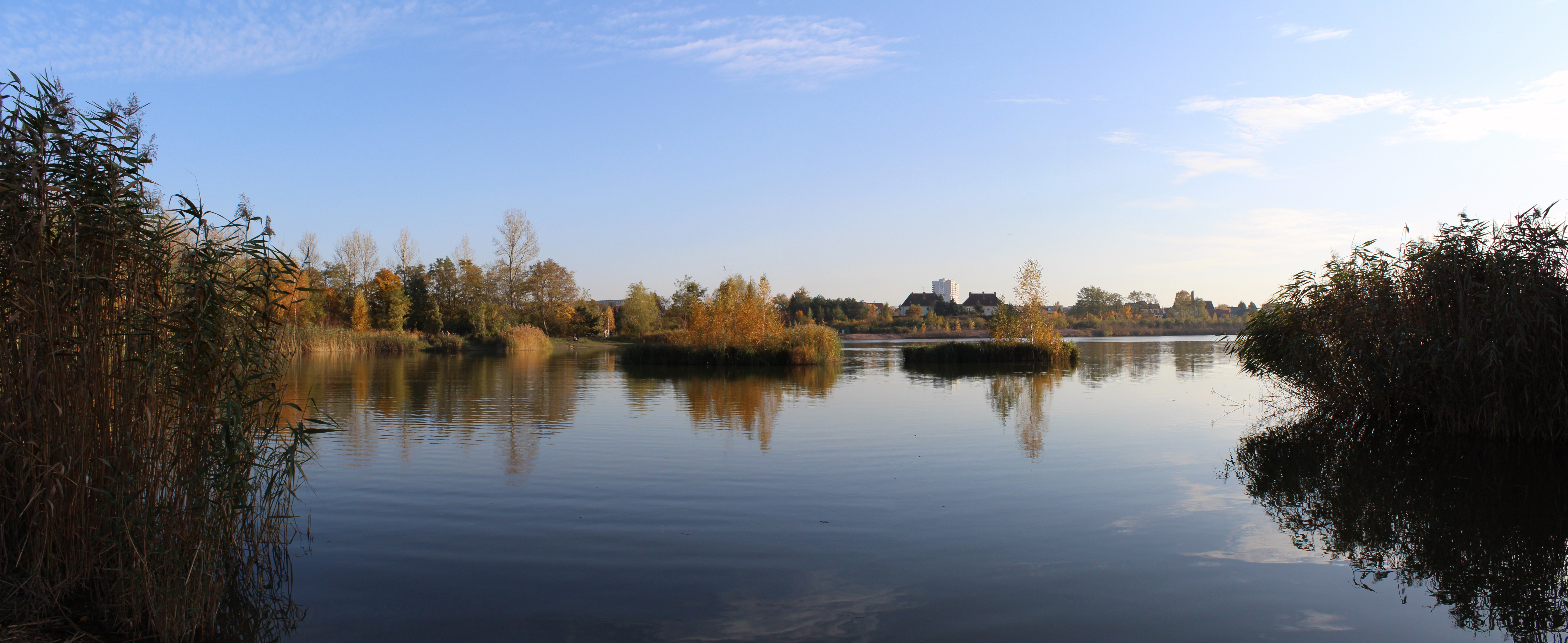 Panorama Heidesee